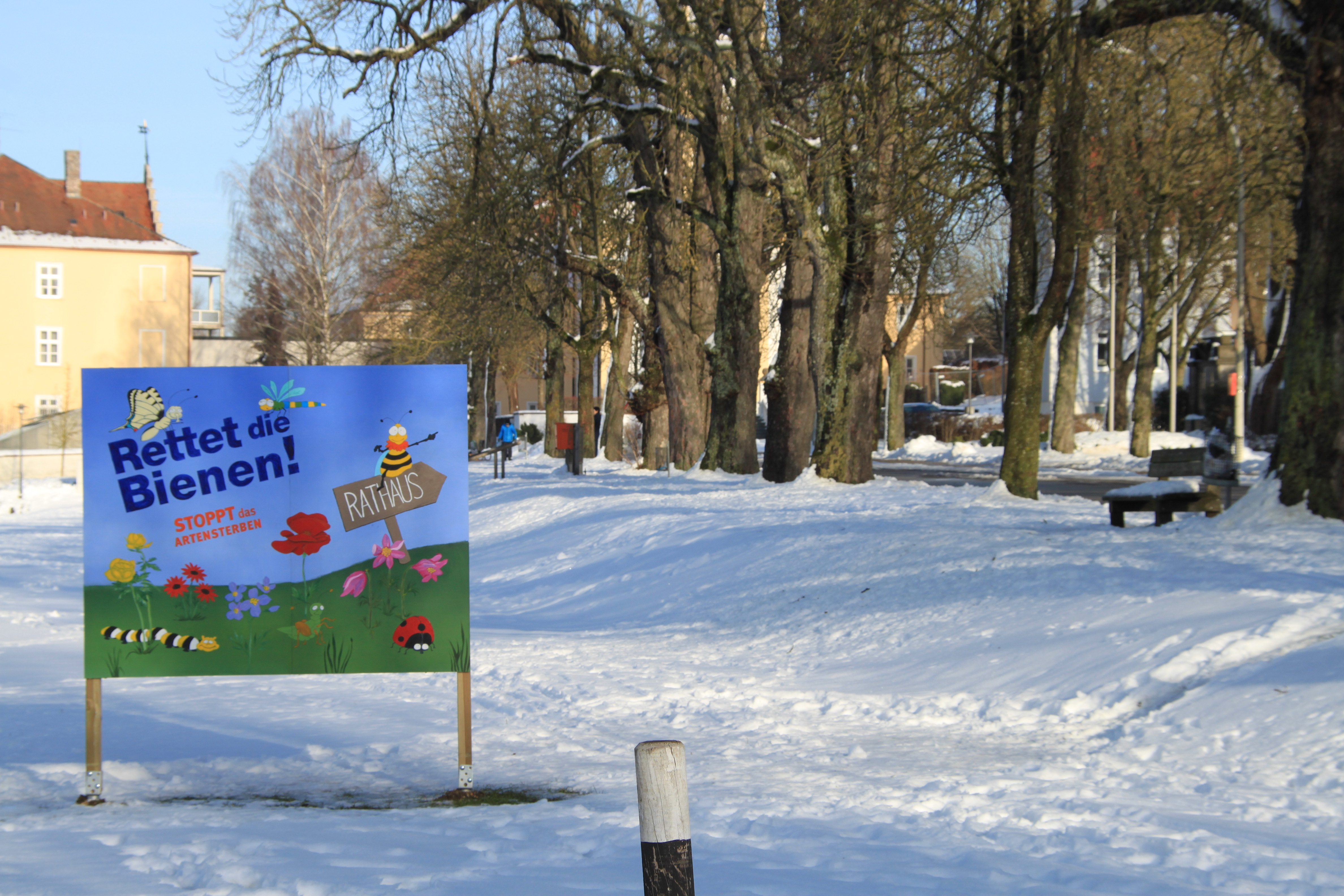 Ein handgemaltes Plakat fordert den Betrachter auf, per Unterschrift im nahen Rathaus seine Stimme für das Volksbegehren "Rettet die Bienen" abzugeben